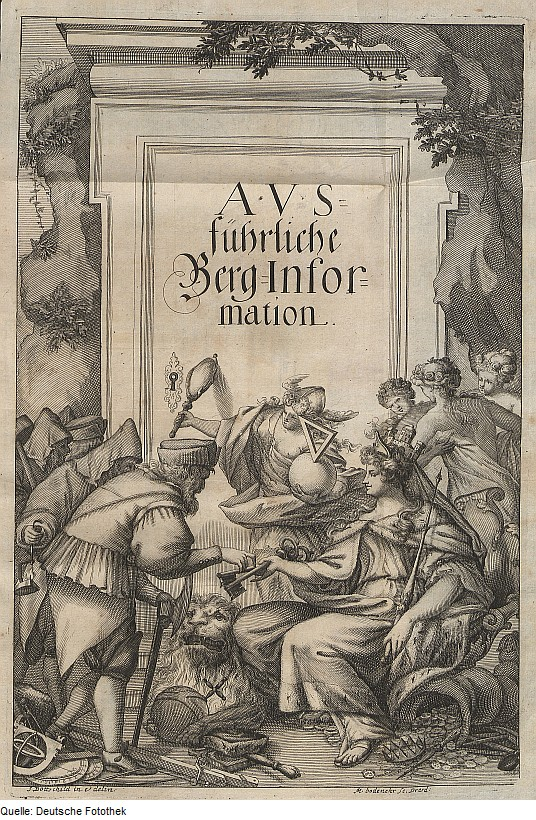 Original image description from the Deutsche Fotothek Bergbau & Rechtswesen & Ratgeber